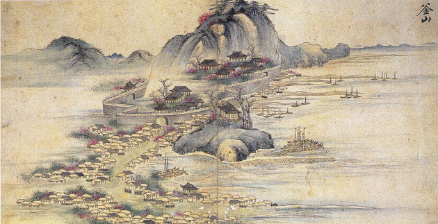 1748년경 그려진 이성린(李聖麟)의 ‘사로승구도(槎路勝區圖), 앞쪽에 영가대 선착장과 그 뒤로 부산진성이 보인다. 그림 앞에 바위처럼 보이는 곳이 영가대이며, 앞은 선착장이고 바로 왼쪽 뒤가 서문이다.